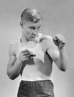 Harry Siljander